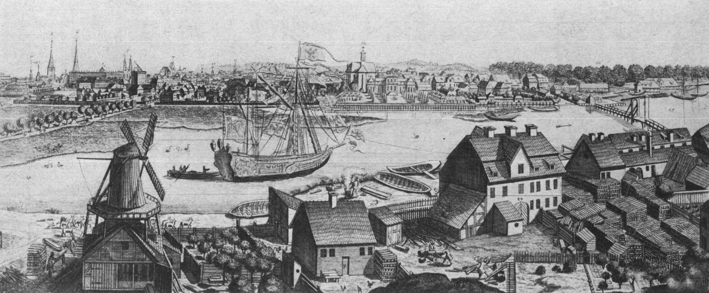 Bildunterschrift in der Brandenburgia: „Ansicht auf den Schiffbauerdamm Berlin, aus dem Prospekt der Stadt Berlin von A. M. Werner. gest. von G. P. Busch 1717. Die Schiffswerft vorn ist Privatwerft am Schiffbauerdamm; gegenüber vor der Dorotheenkirche das Kamesche Haus, später Loge Royal York; rechts neben ihr die Kurf. Bauwerft. Auf dem Strome die Prunkjacht des 1. Preußenkönigs Fridericus.“